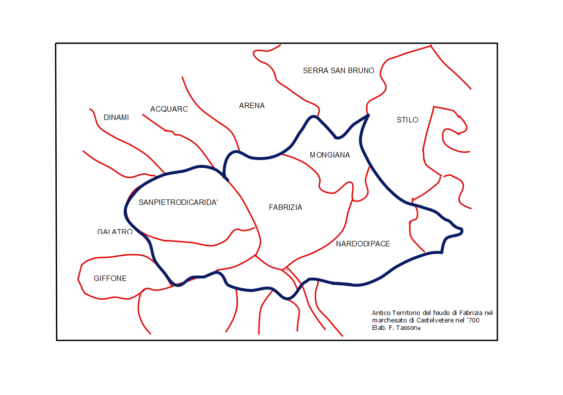 Antico territorio del feudo di Fabrizia - Prunari/Cropanei nel Marchesato di Castelvetere dei Carafa nel '700